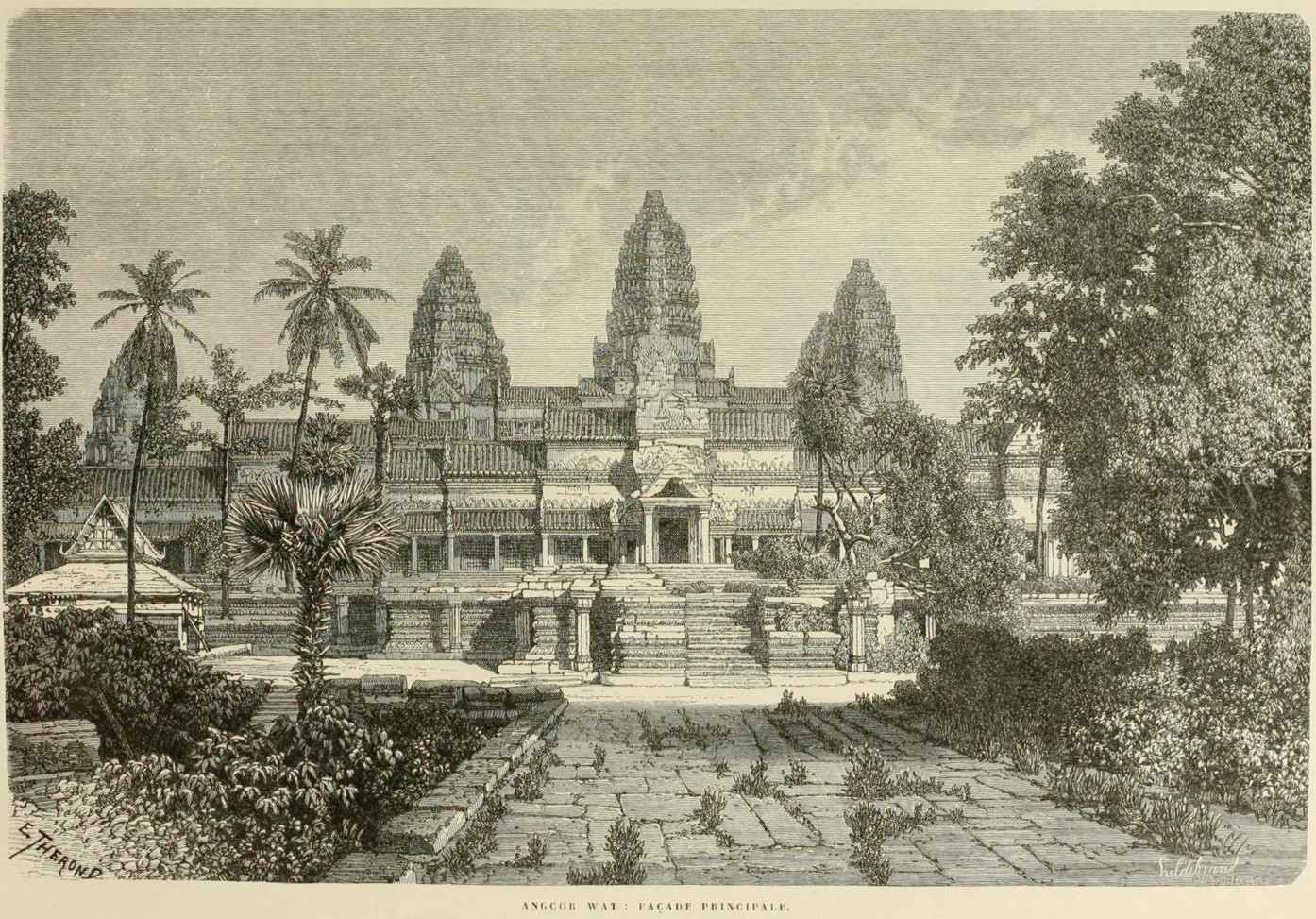 Porte de l'ouest, Angkor Wat, 1866: Voyage d'exploration en Indo-Chine vol. 1 f.p. 44